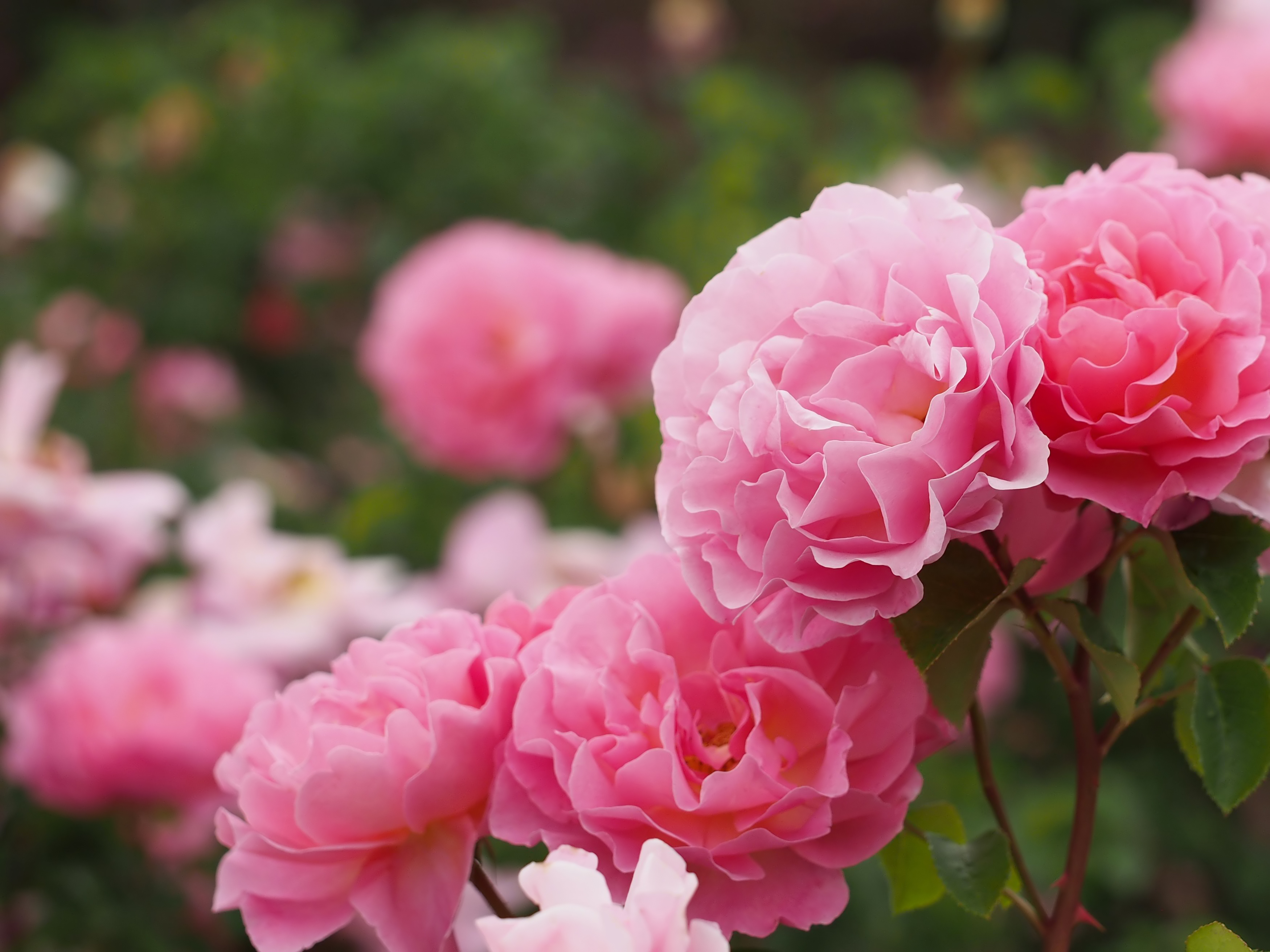 Rose, Lilian Austin, バラ, リリアン オースチン, English Rose イングリッシュローズ United Kingdom イギリス Austin 1981